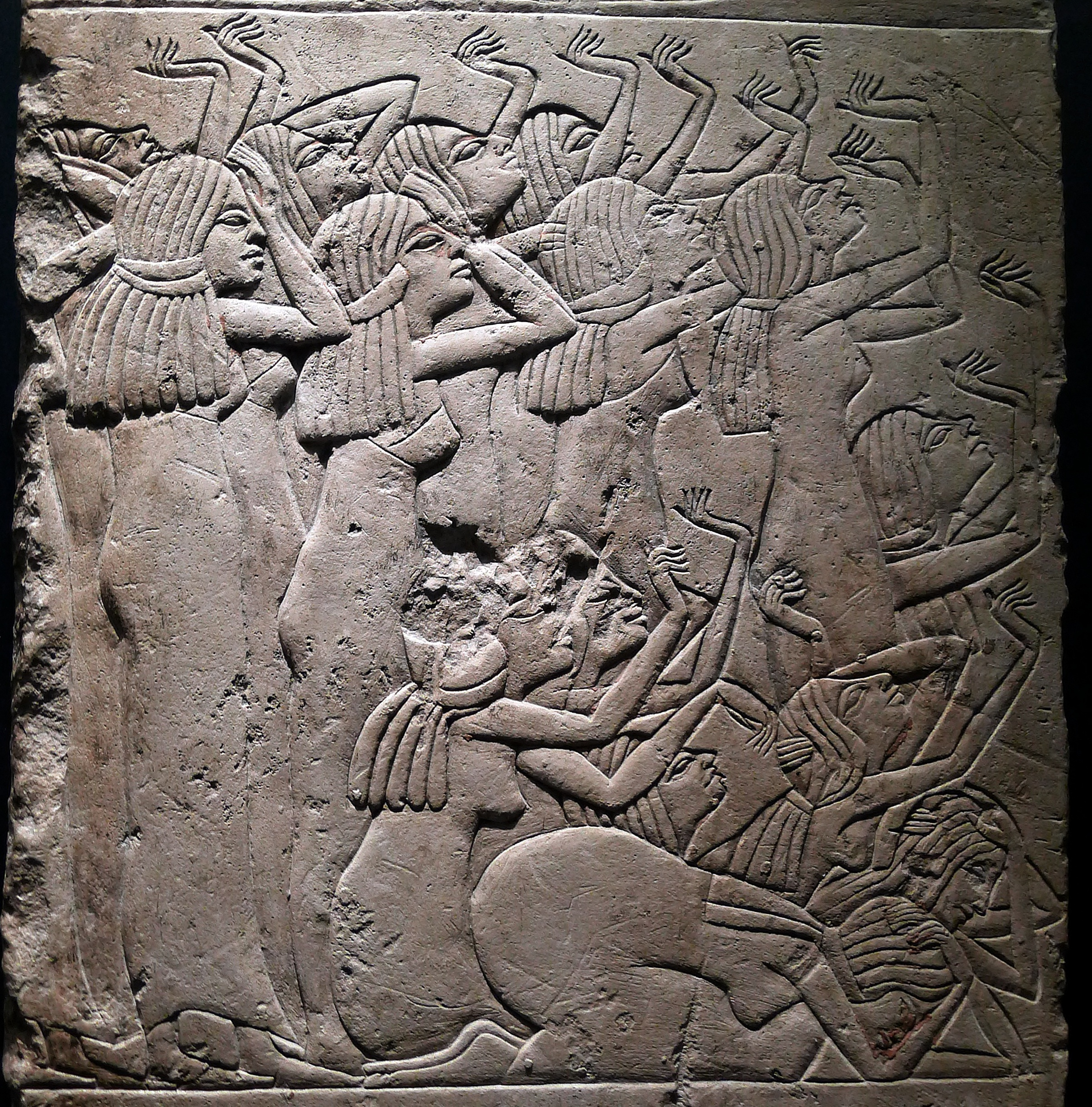 Lamentations pendant l’enterrement (pleureuses) – détail central